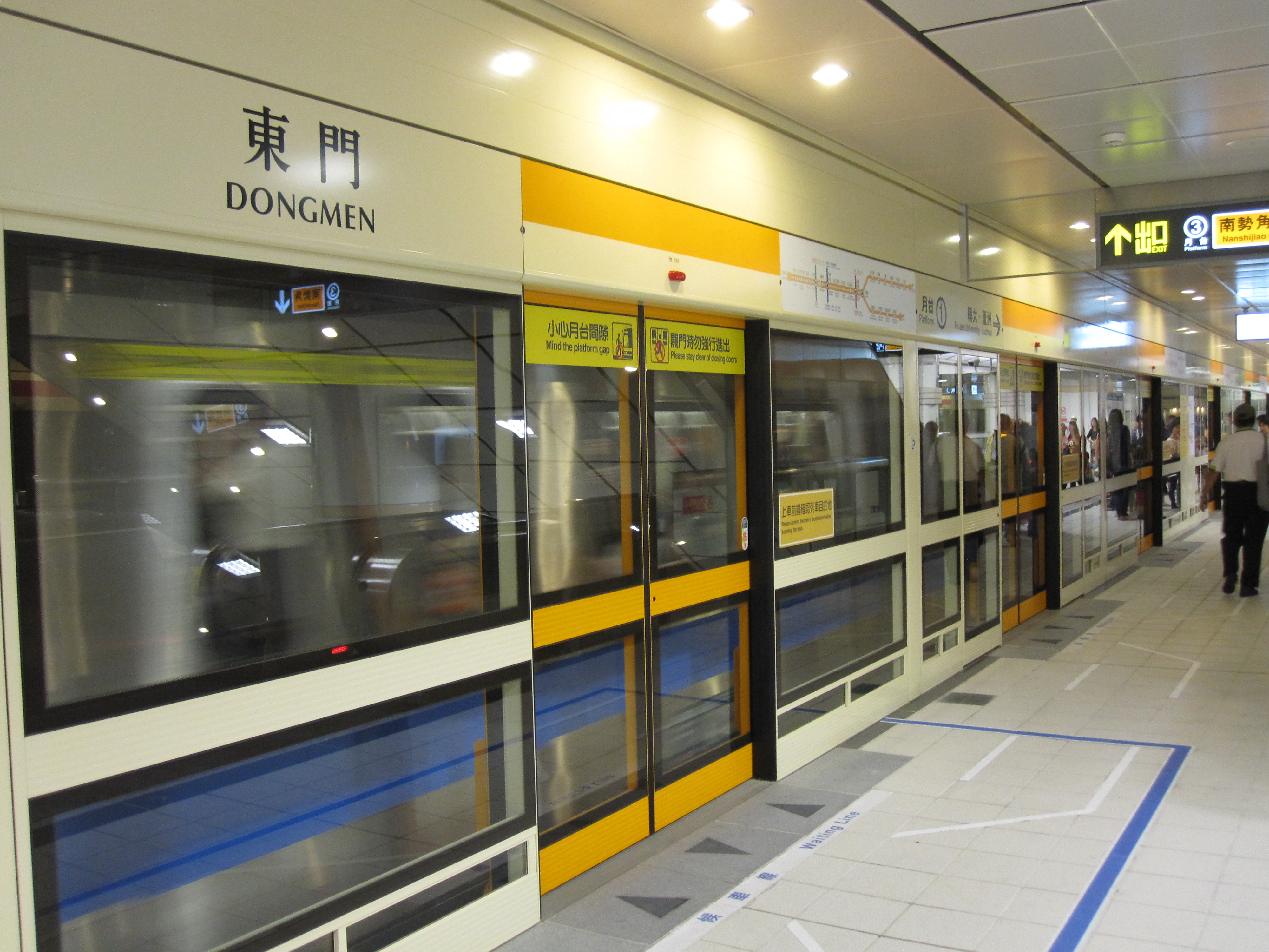 台北捷運東門站月台1。